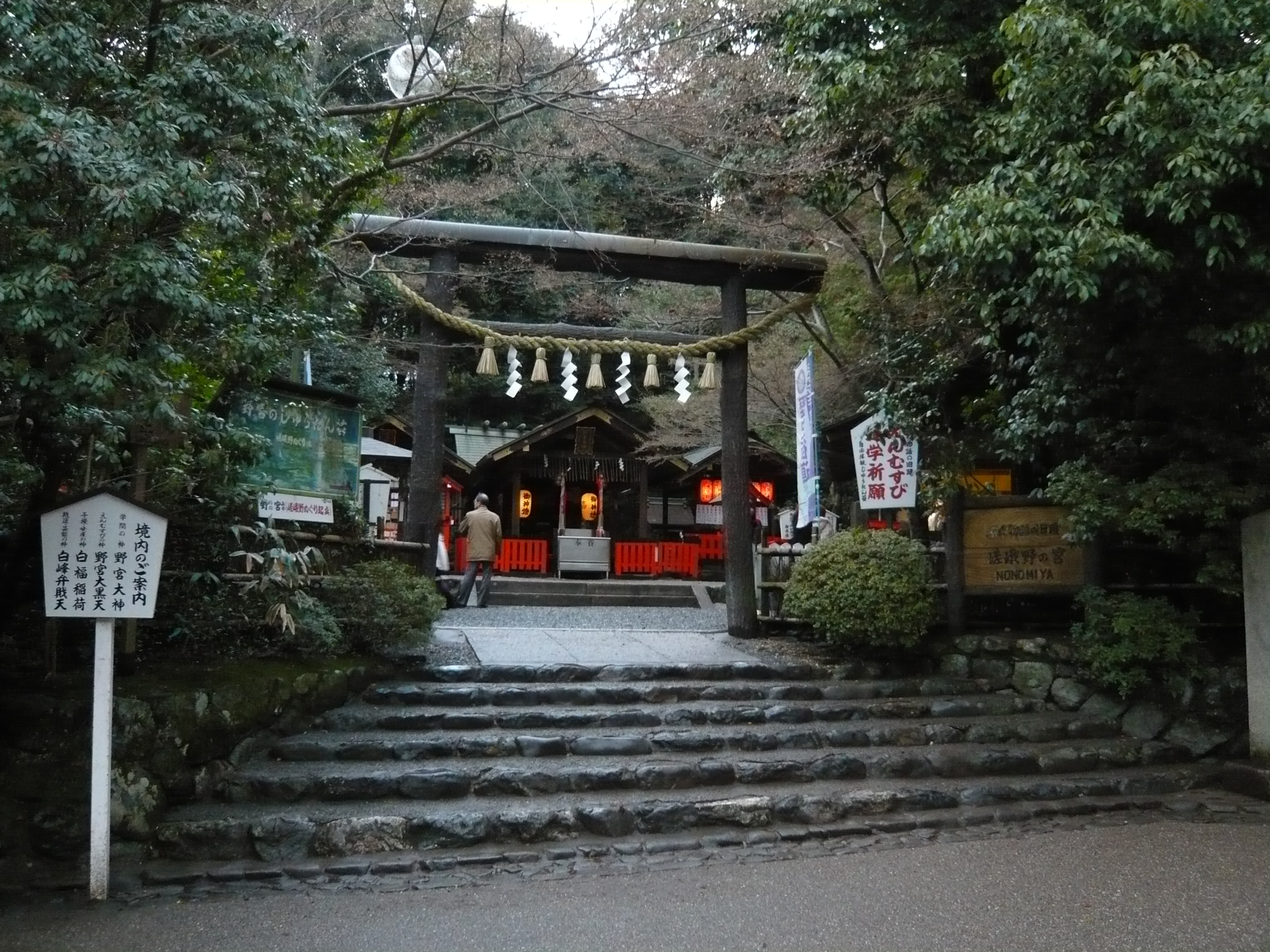 the Torii gate of Nonomiya-jinja, Ukyō, Kyōto, Japan 野宮神社（京都市右京区）鳥居